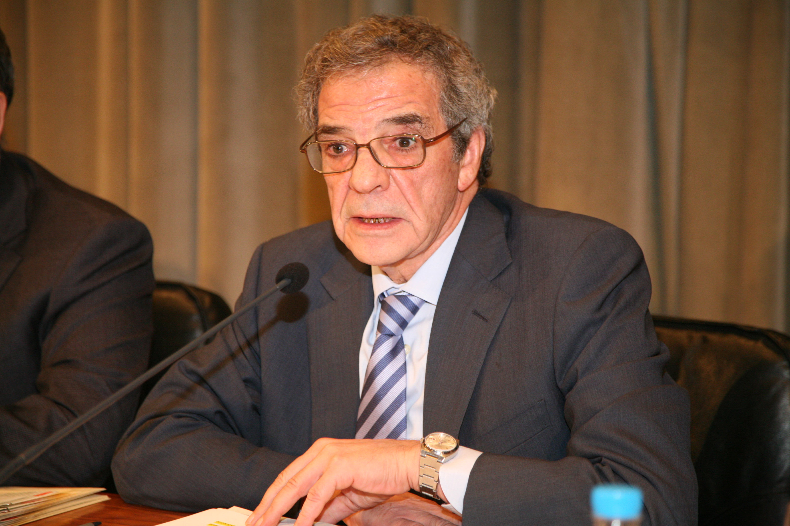 César Alierta en la presentación de los Premios del Consejo Social 2011